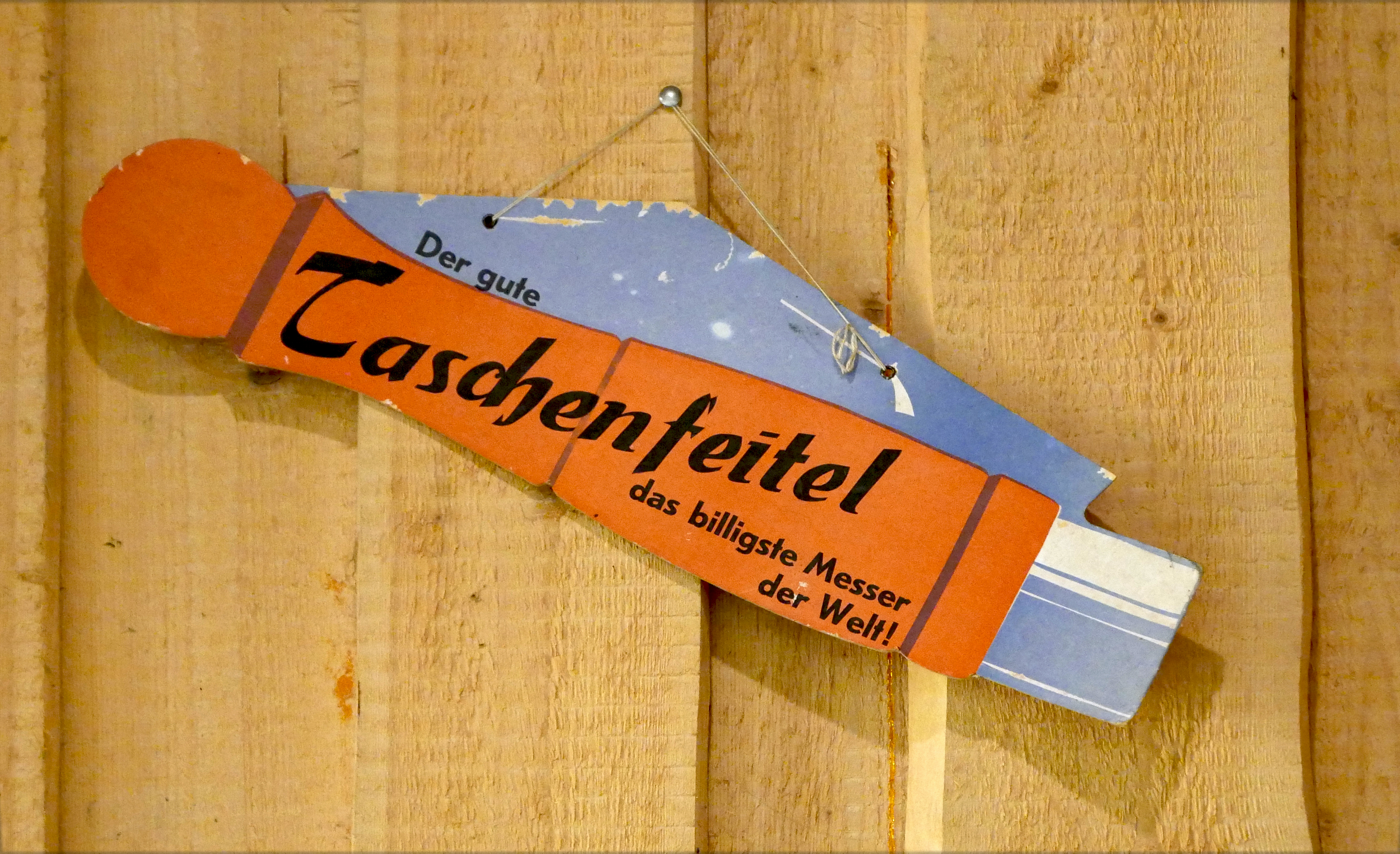 Museum in der Wegscheid : Altes Reklameschild